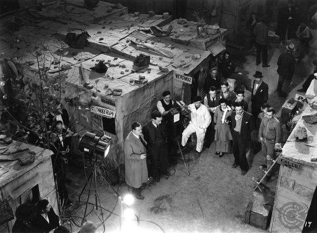 Rodaje del film Puerto Nuevo (1936), de Luis César Amadori y Mario Soffici. Junto a la cámara (y frente a una escenografía de Fernando Ribero), Amadori, Soffici, Vicente Cosentino, Francis Boeniger y Bruno Boval.